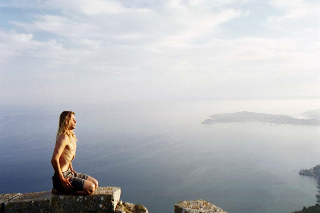 Loïc Leferme recordman, du monde apnée No-Limit